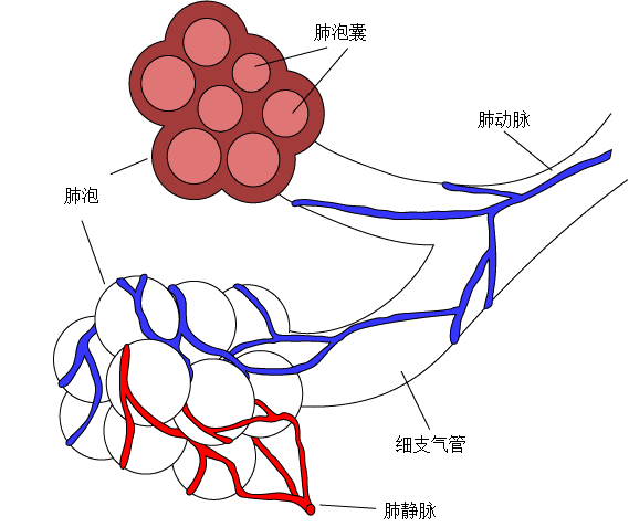 肺泡切面和外部图。由Pdefer制作